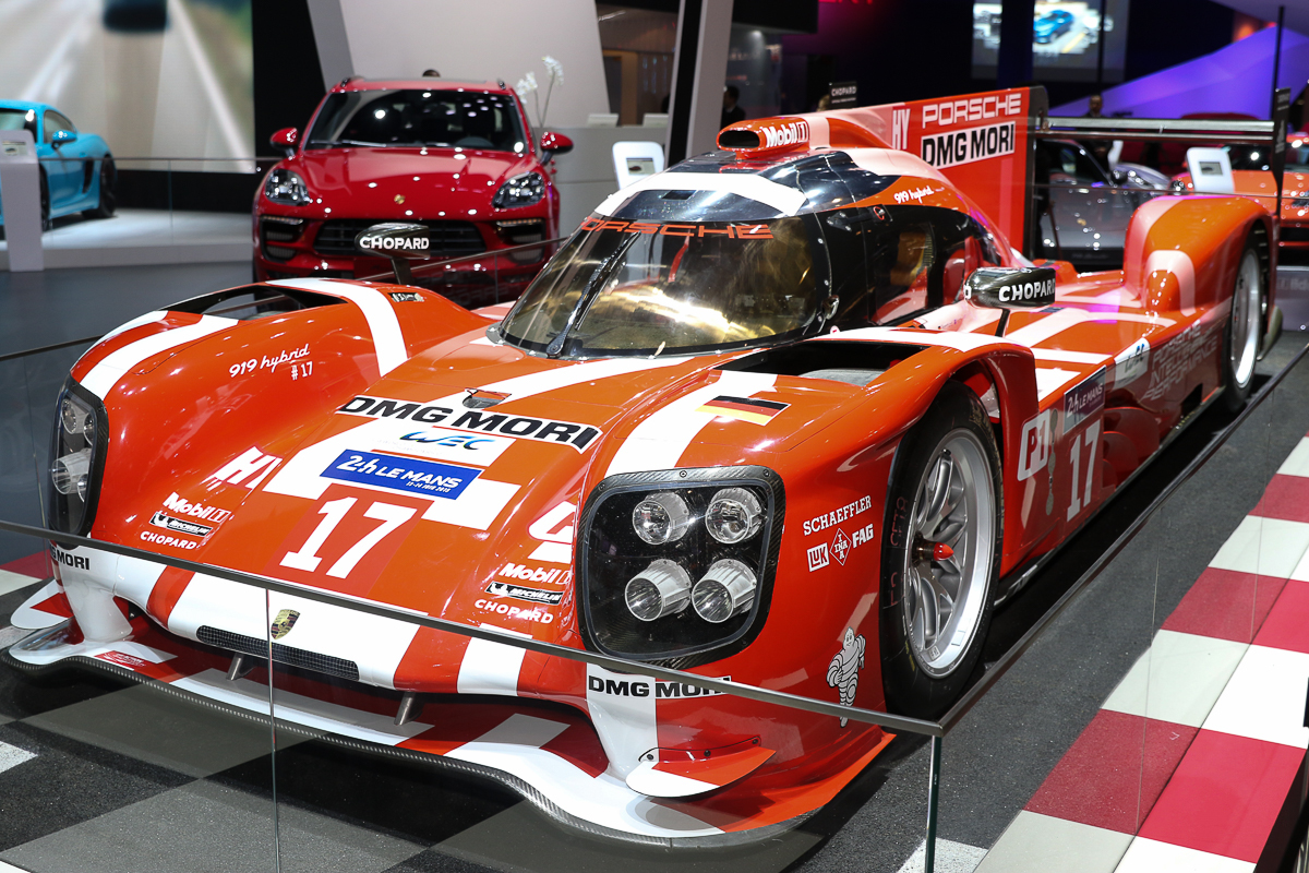 Salão do Automóvel 2016